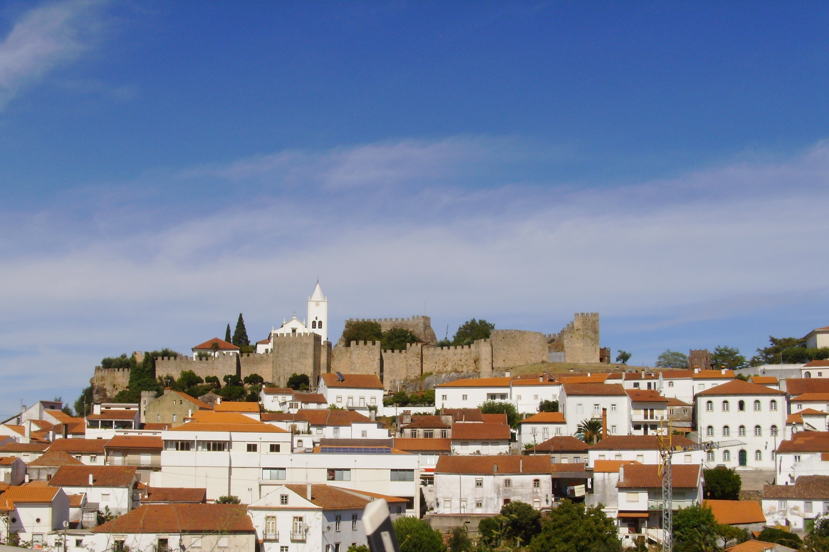 Castelo de Penela, freguesia de Santa Eufémia, concelho de Penela, distrito de Coimbra, Portugal: vista panorâmica.